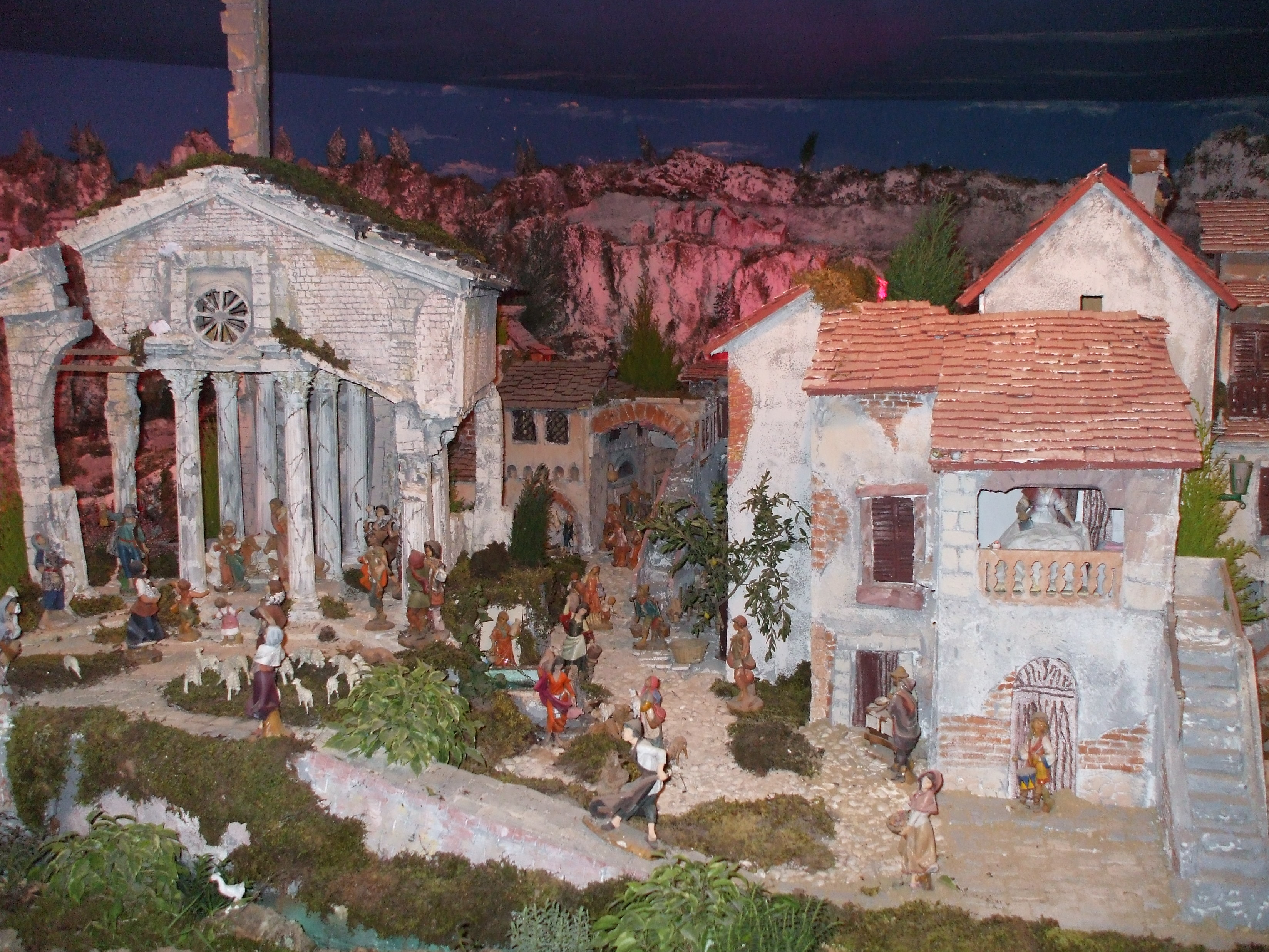 Cecchina di Albano Laziale, particolare del presepe artistico cecchinese